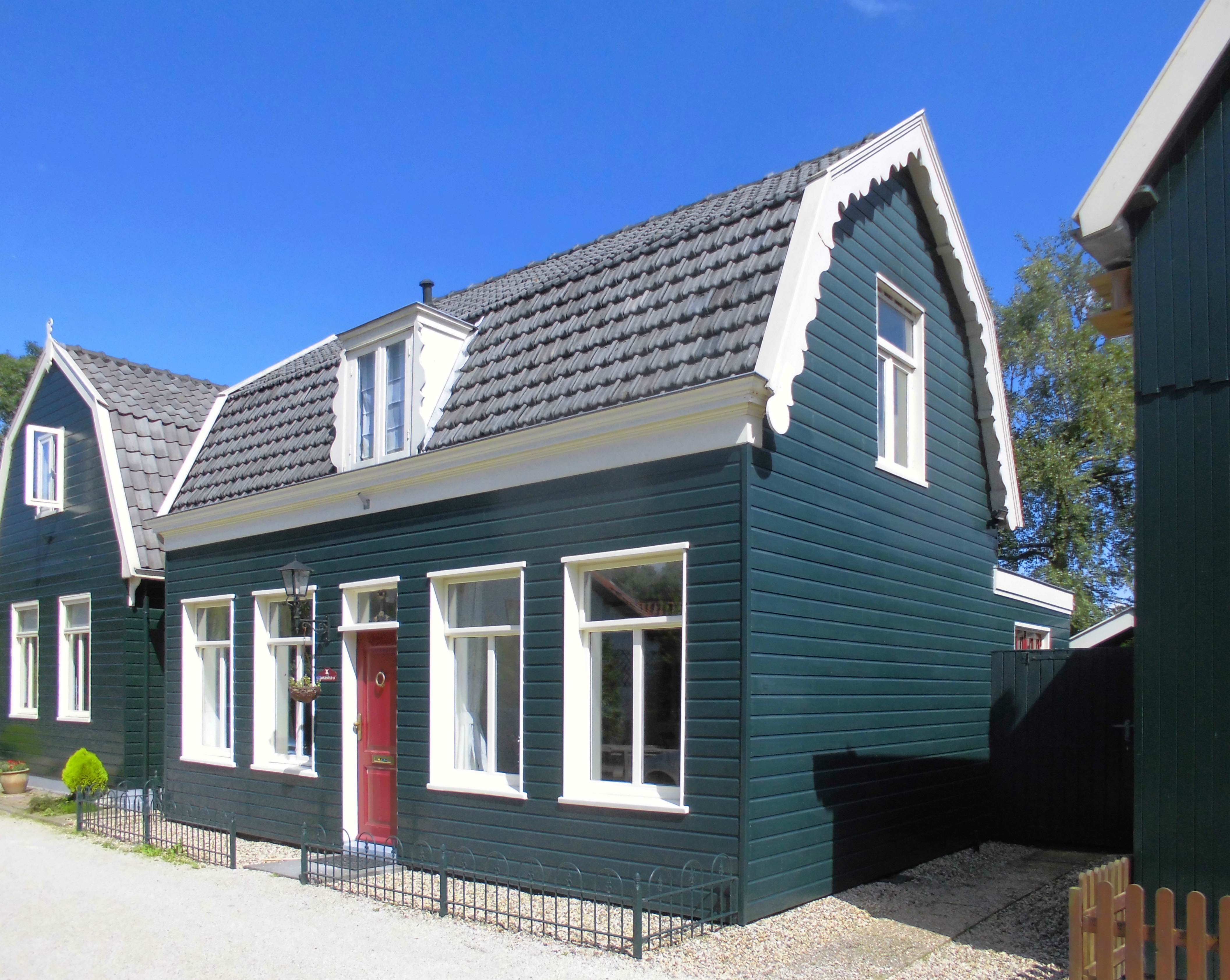 Molenpad 13 Weesp